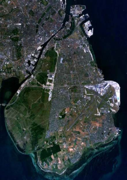 Amager, cut from Image:Copenhagen 12.57744E 55.66605N.jpg